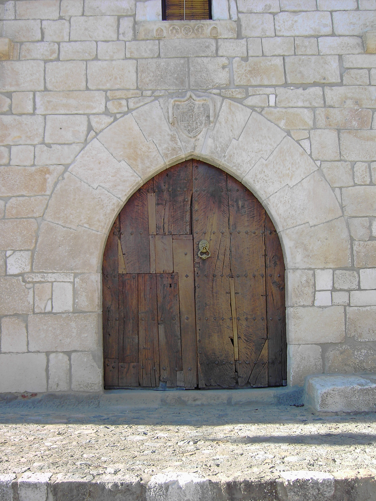 Puerta de Casa Sampietro de Lecina.